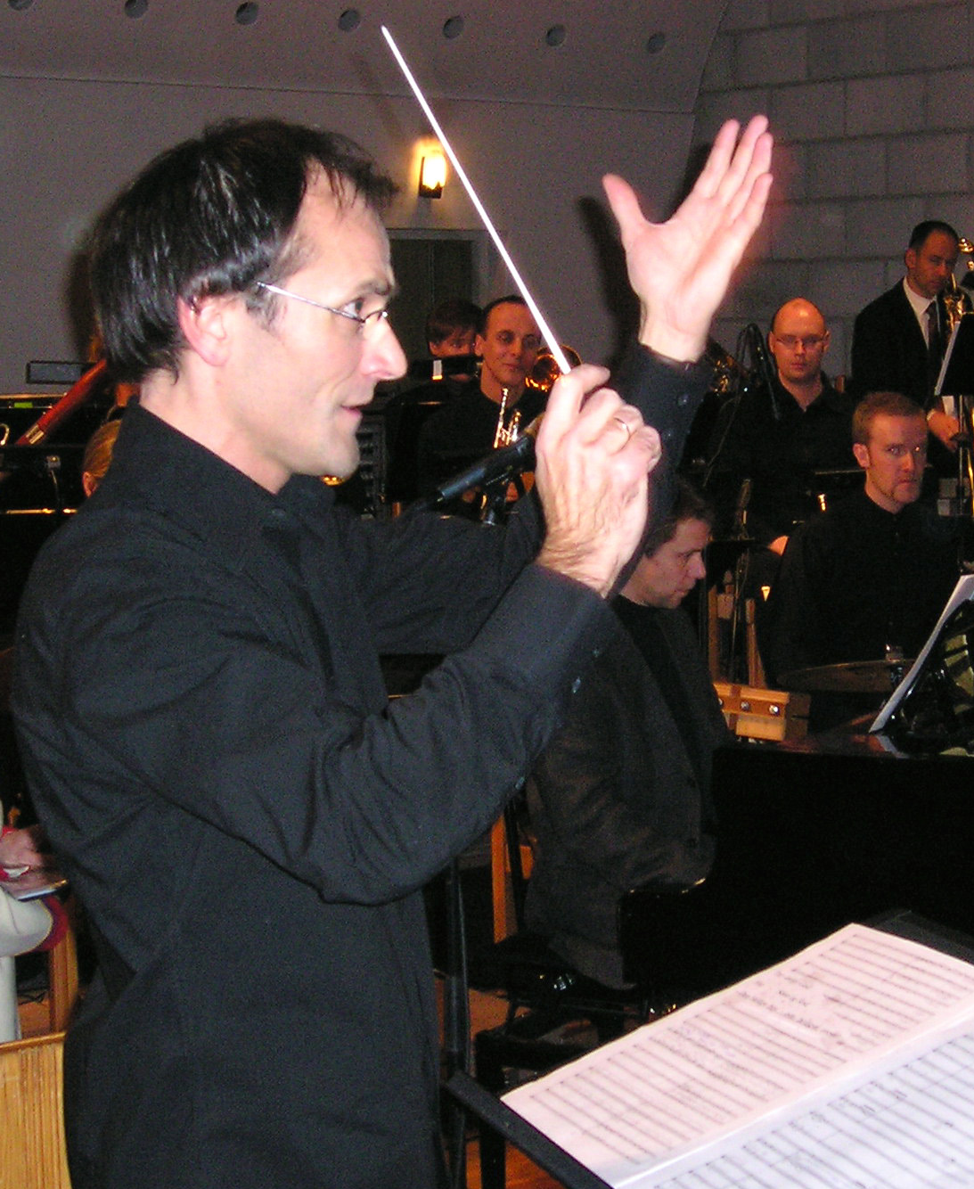 Bjørn Andor Drage